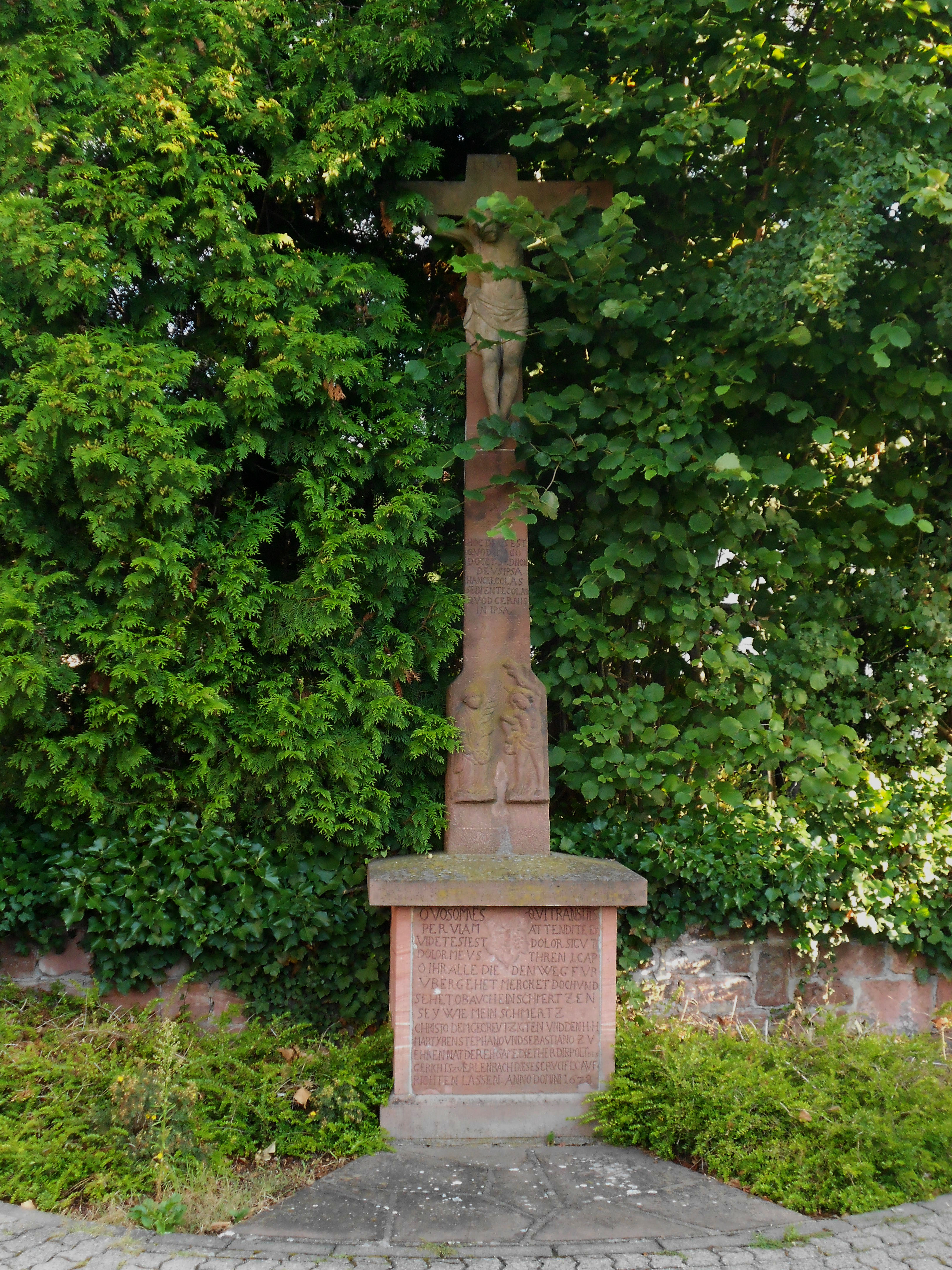 Sandsteinkruzifix in Erlenbach am Main von 1678, gestiftet von Dieter Diepolt († 1676), der seine Frau Margarete Diepolt 1629 in einem Hexenprozess und seine Kinder Ottilie und Michael 1632 durch die Pest verloren hatte. Die Inschrift im Sockel deutet die großen Schmerzen an, die er erleiden musste. Standort Ecke Altdorfstraße / Brückenstraße.